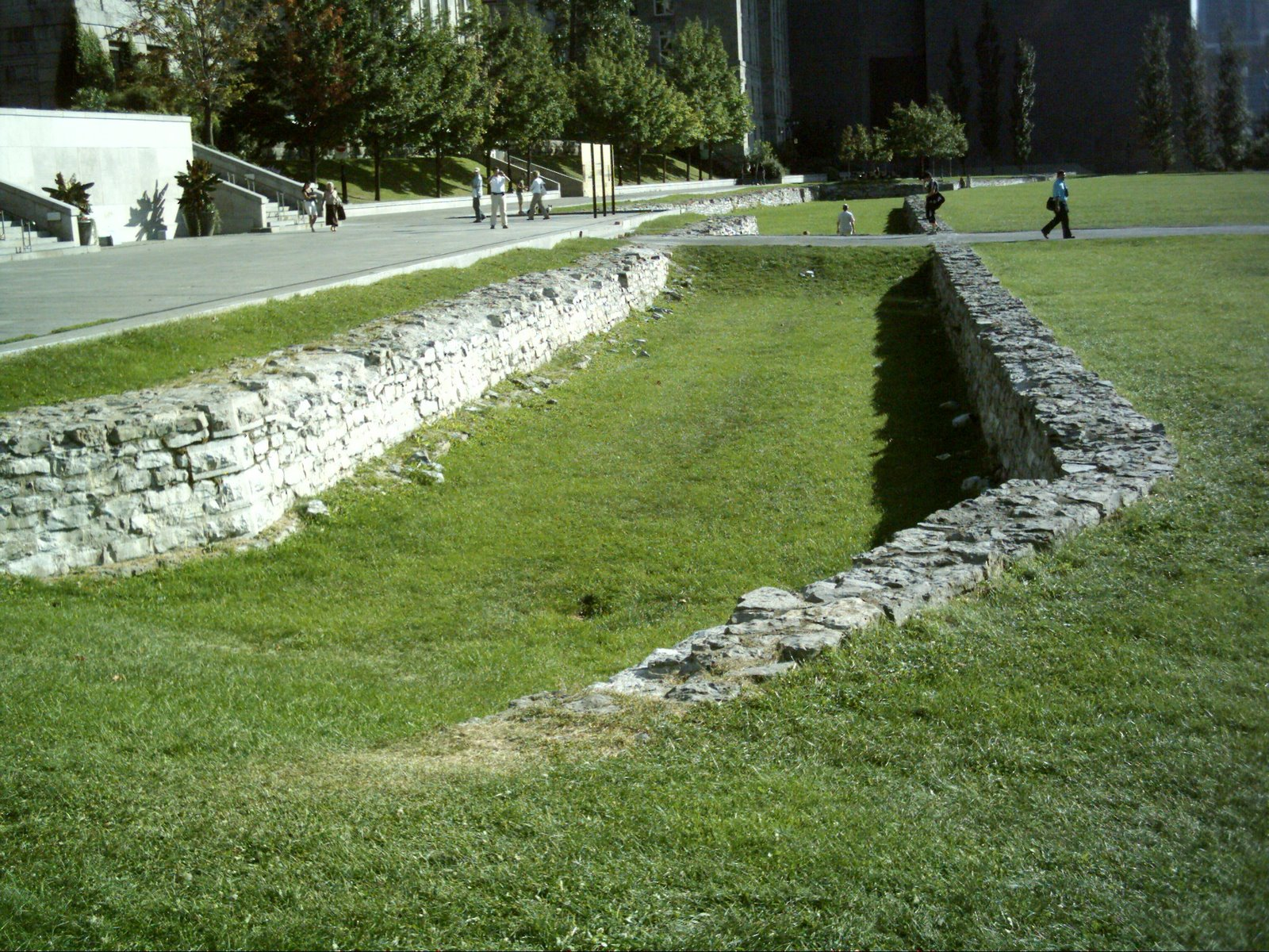 Vue du Champ de mars de Montréal, vestige des anciennes fortifications de la ville